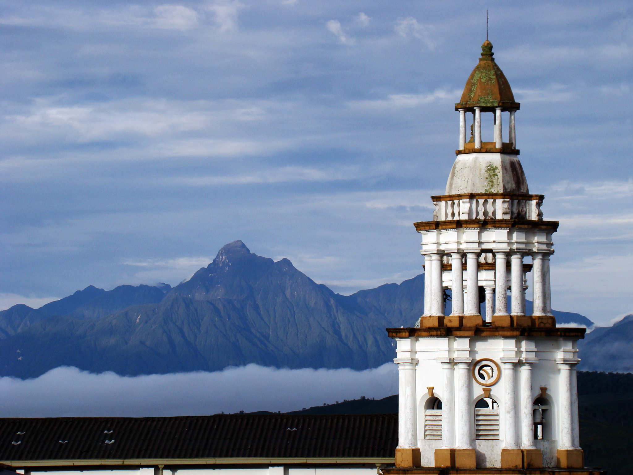 Torre derecha de la iglesia del municipio de Concordia (Antioquia); tras esta se aprecia la otra torre. Al fondo, estribaciones de la Cordillera Occidental.